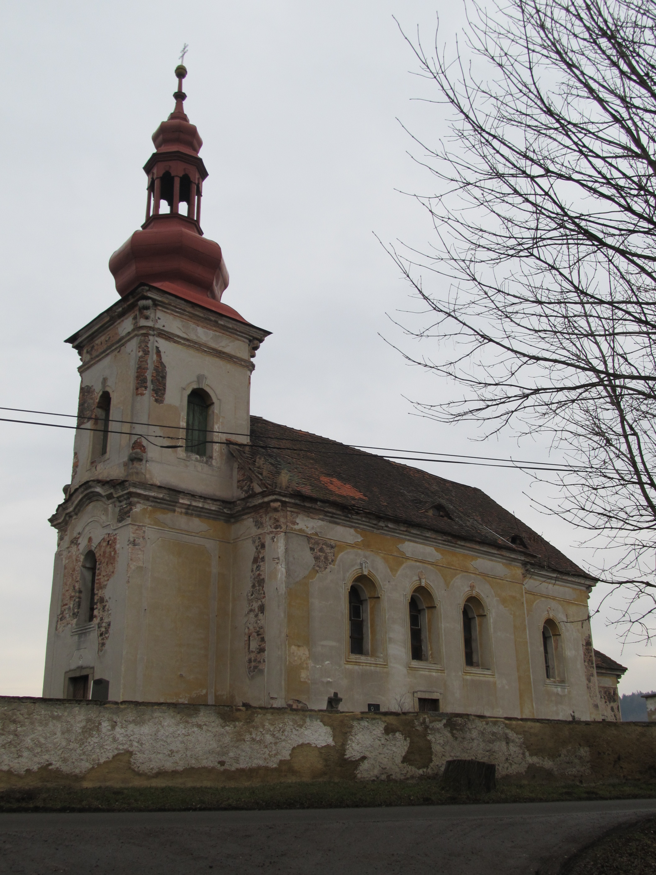 Skytaly - kostel svaté Markéty